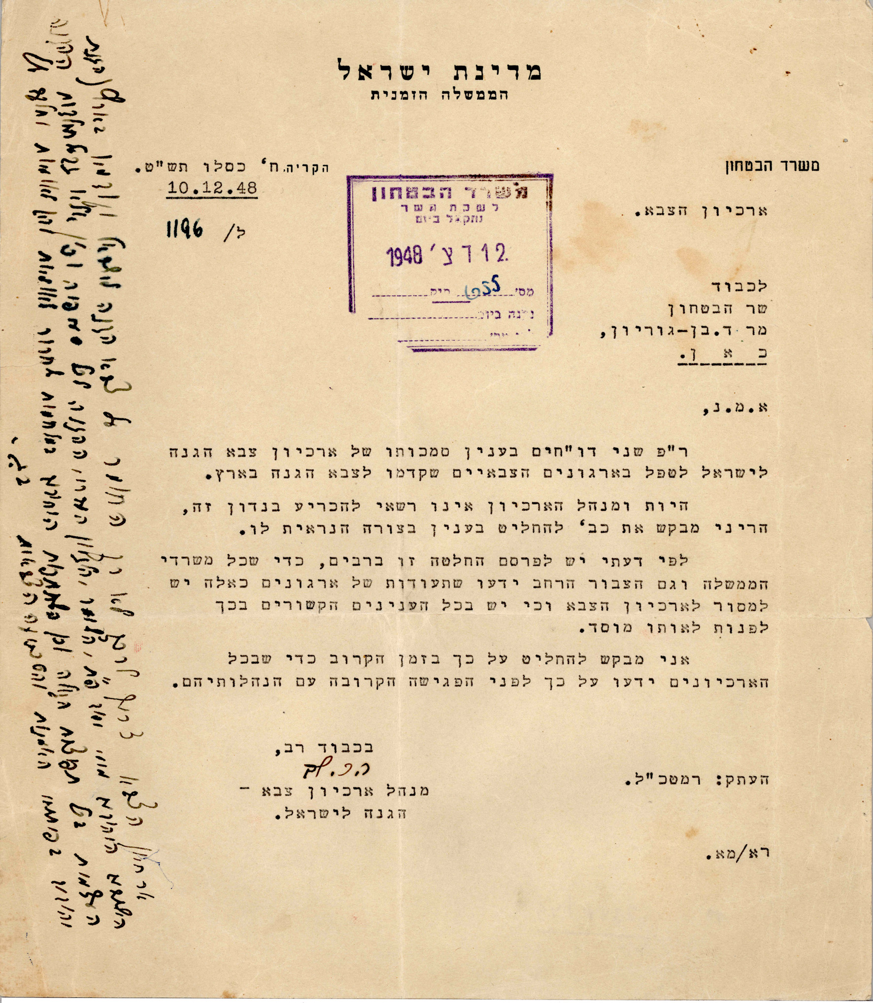 באדיבות ארכיון צה"ל ומערכת הביטחון-מסמך הקמת ארכיון הצבא